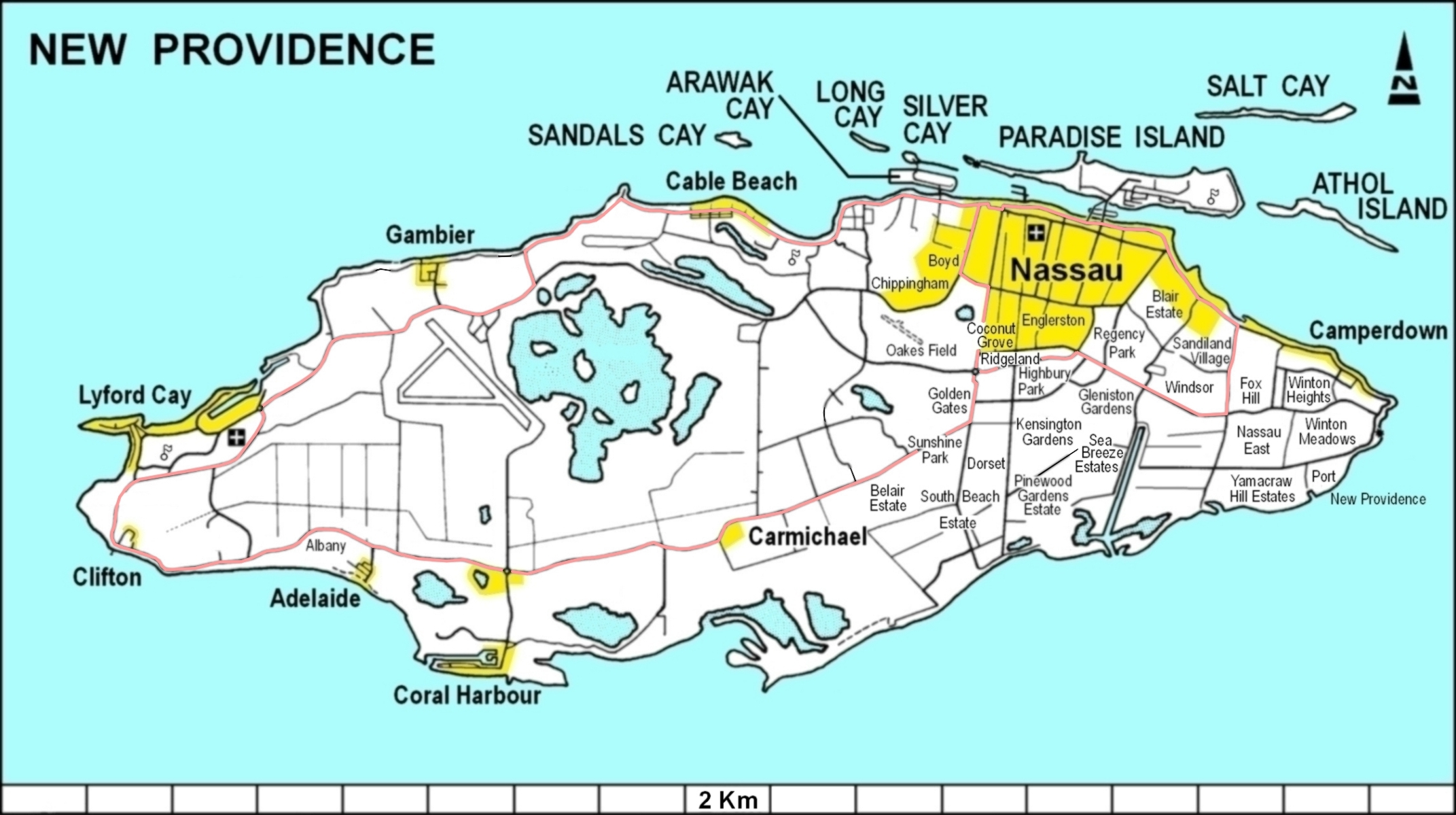 Karte von New Providence